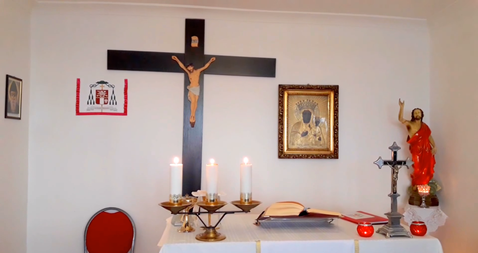 Kaplica KKN w Warszawie